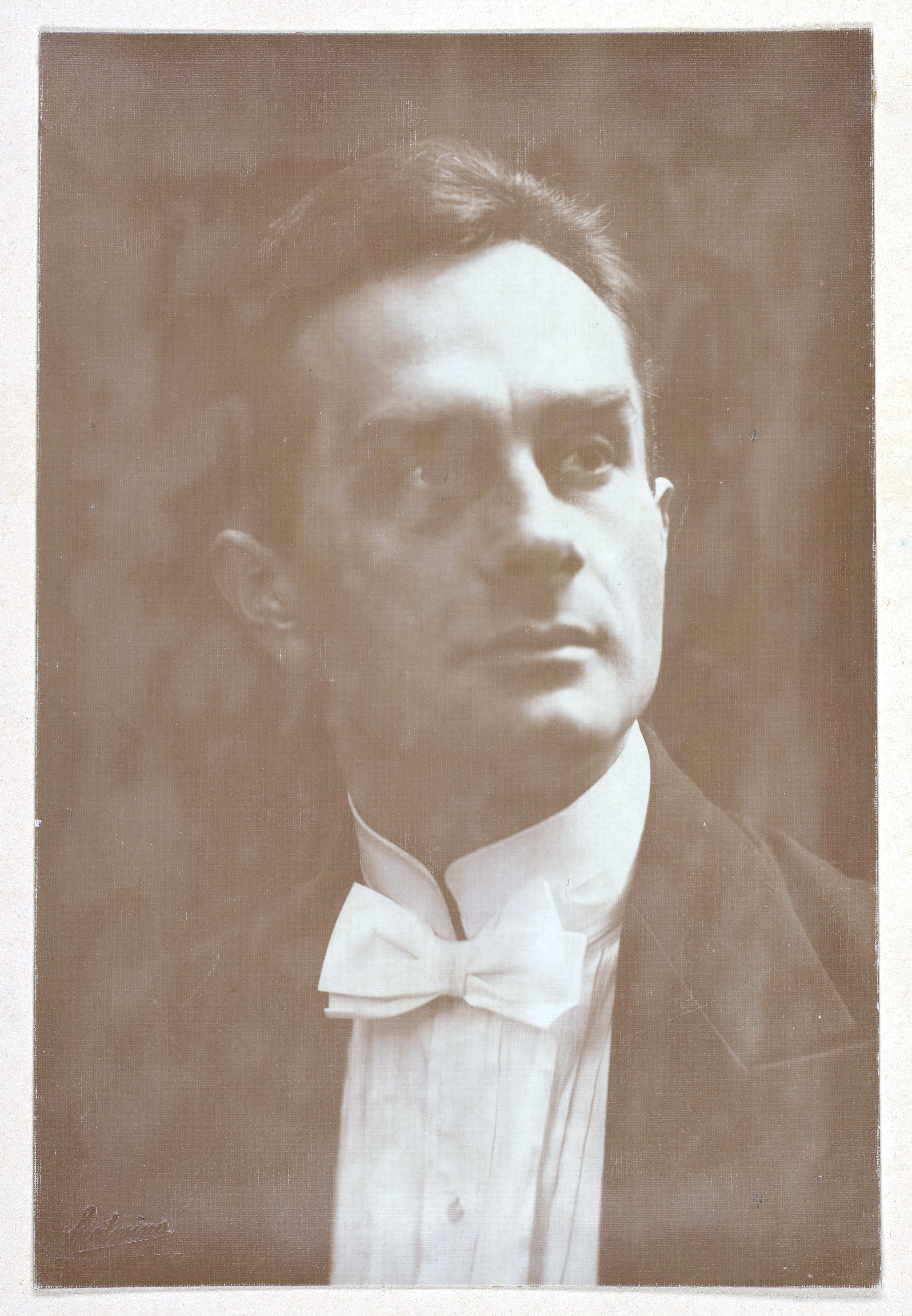 Witold Friemann